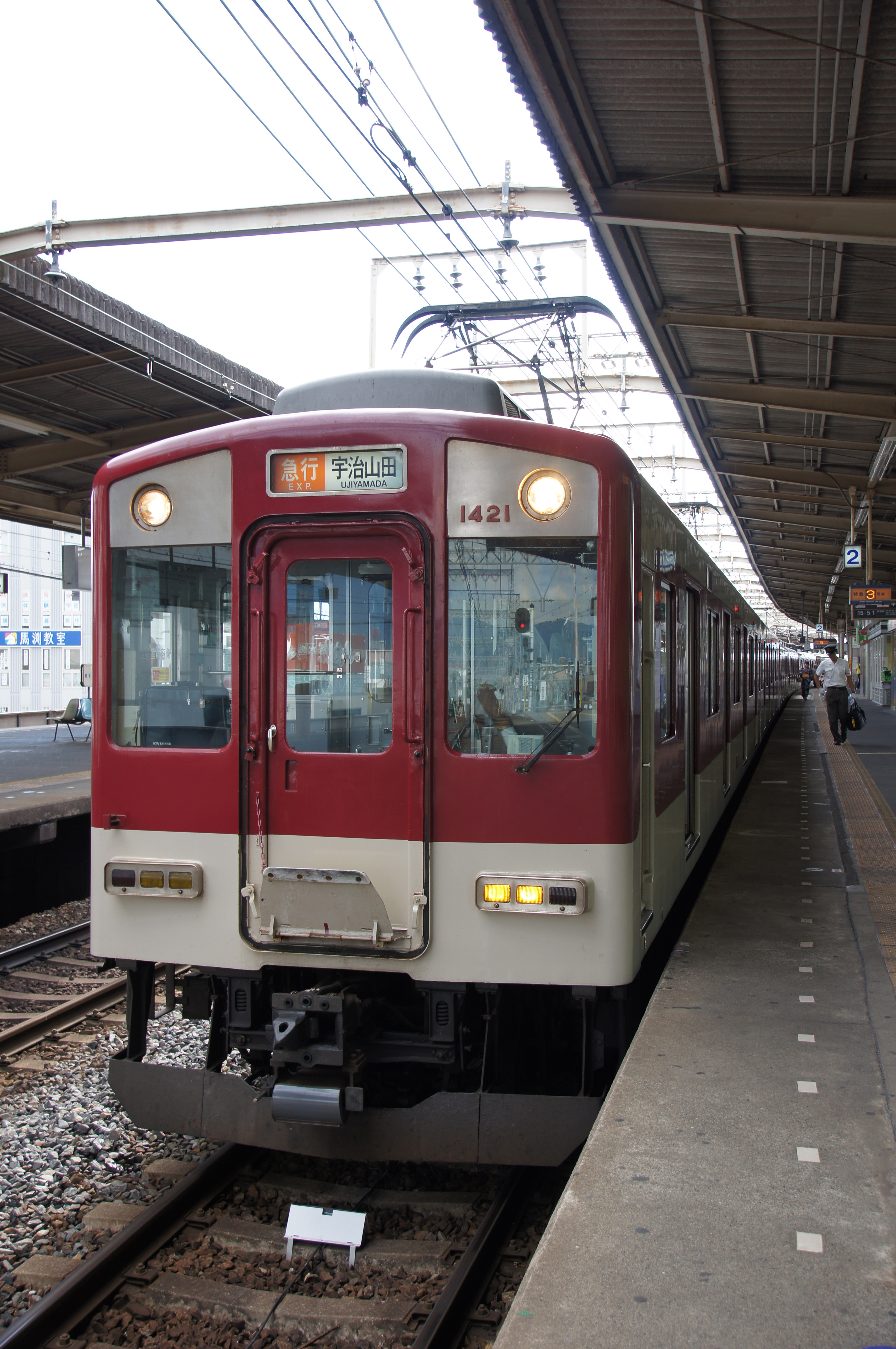 1420系による宇治山田行き急行。大和八木にて。